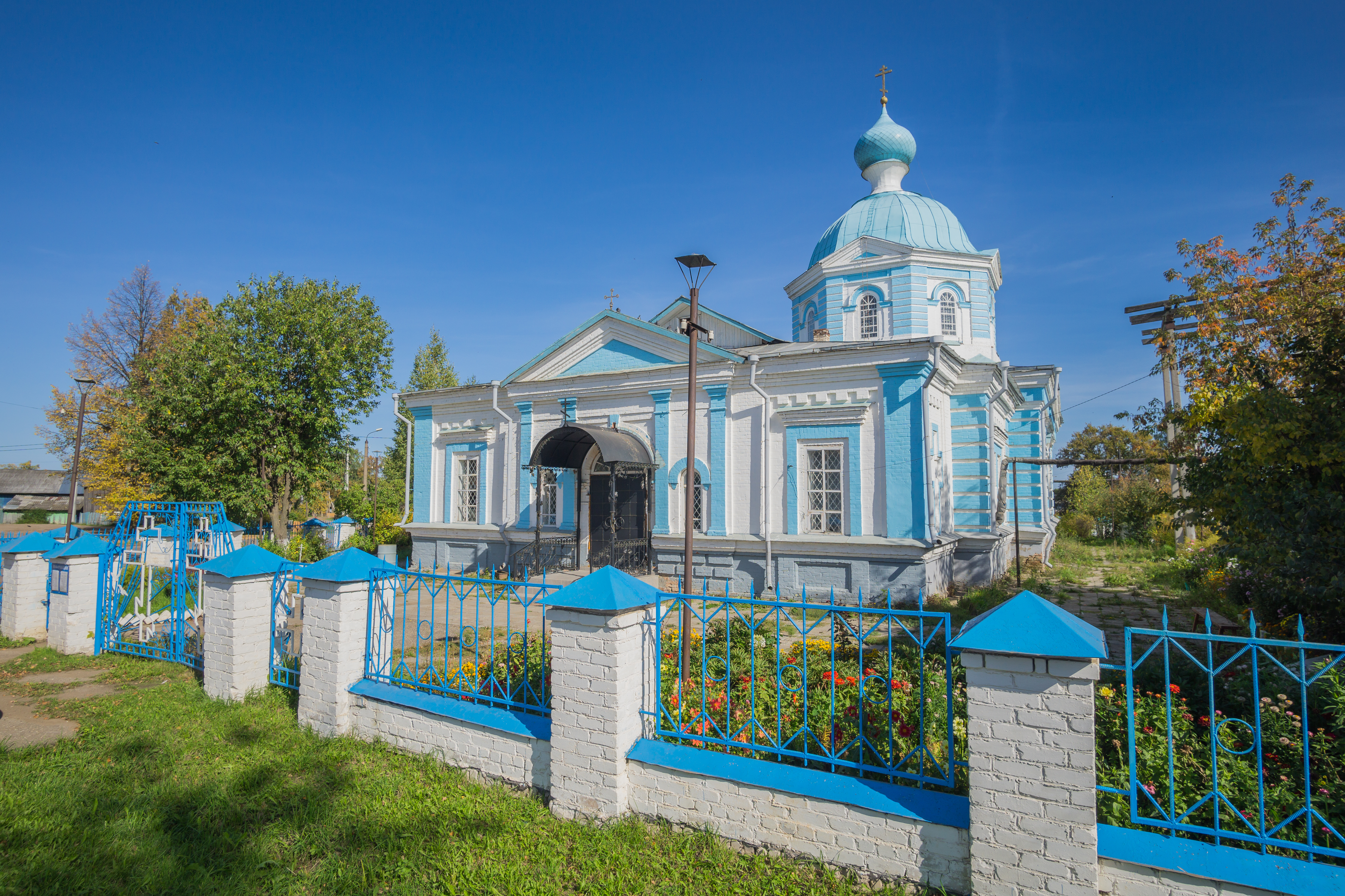 церковь Нкольская: Тоншаево, Тоншаевский район, Нижегородская область